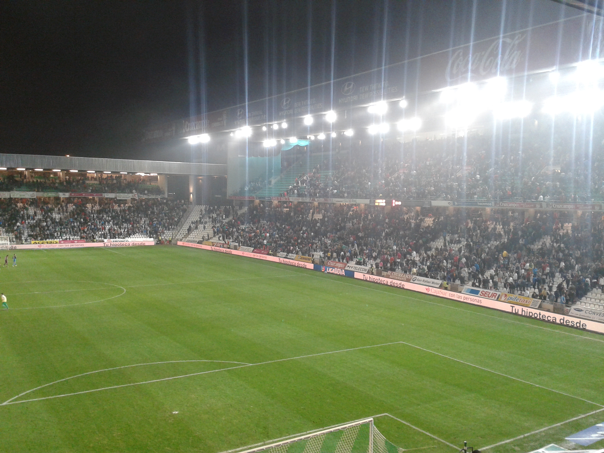 Córdoba (España).